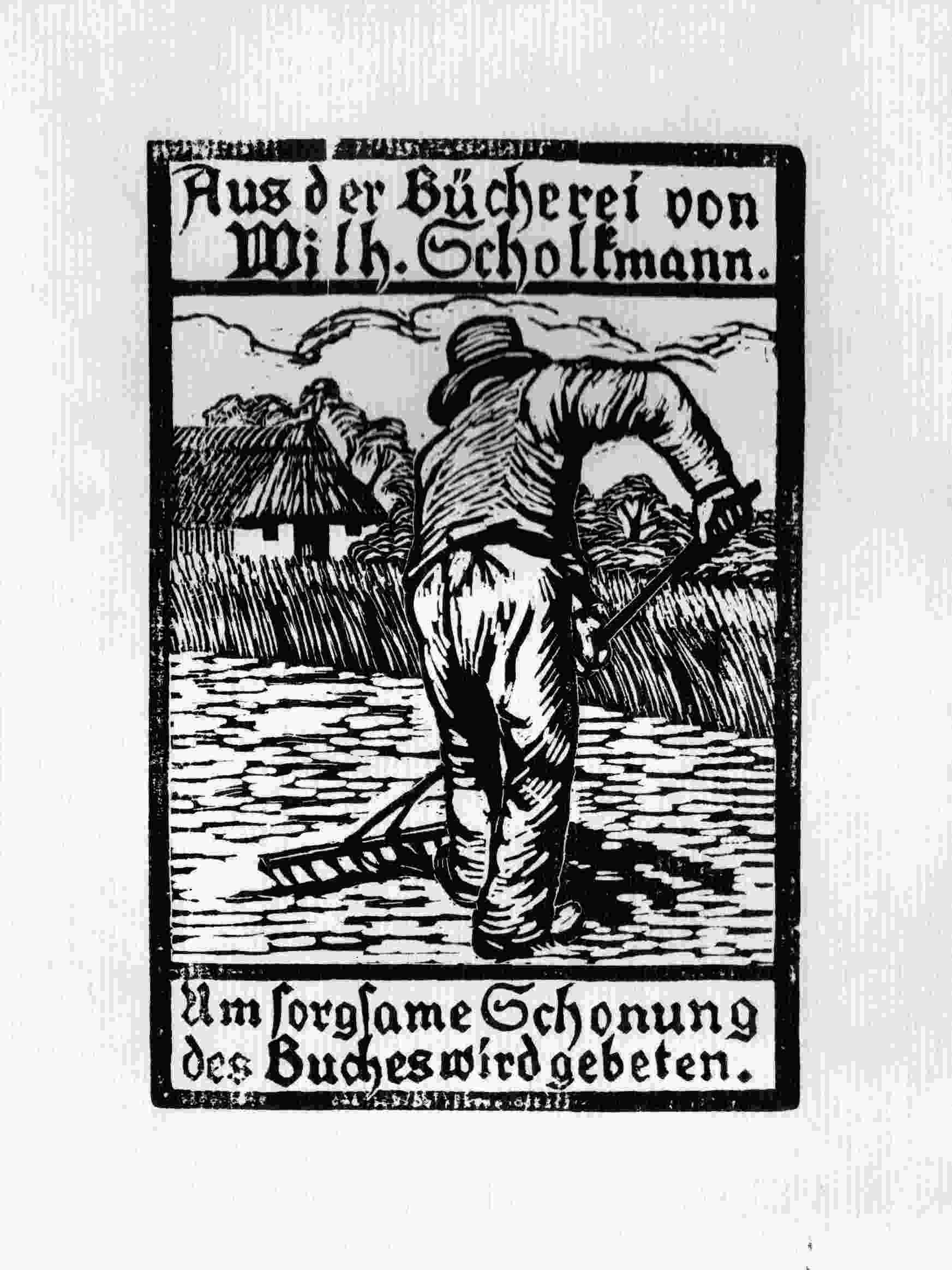 Wilhelm Scholkmann-Bücherei